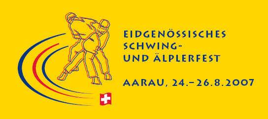 Logo Eidg. Schwing- und Älplerfest 2007, Aarau AG, Schweiz